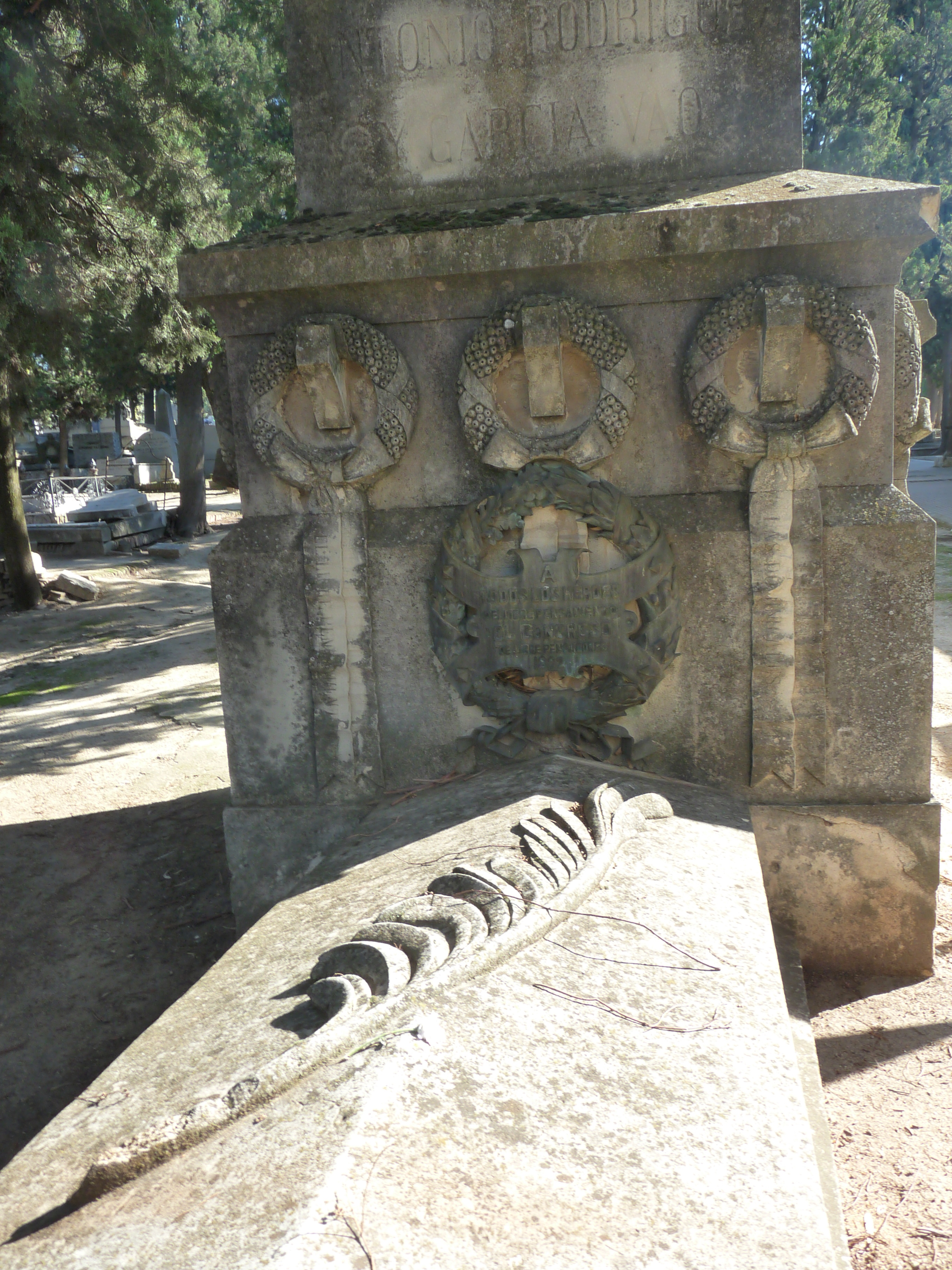 Mausoleo de Antonio Rodríguez García-Vao, cementerio civil de Madrid.